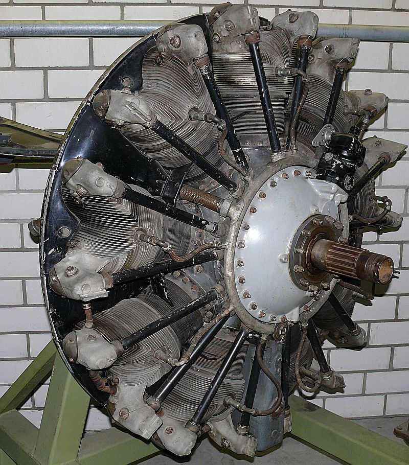 R-1340, eigenes Bild